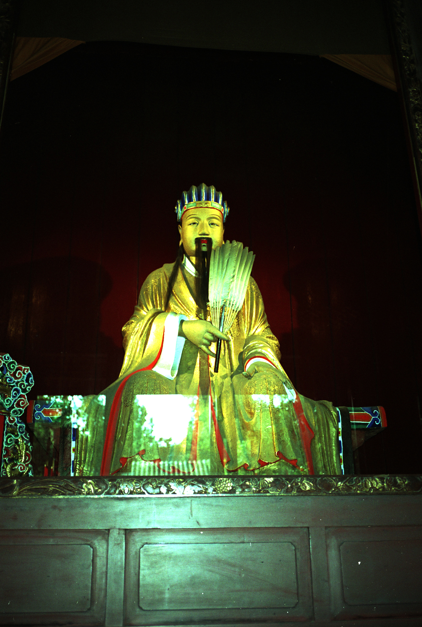 成都武侯祠诸葛亮塑像.JPG